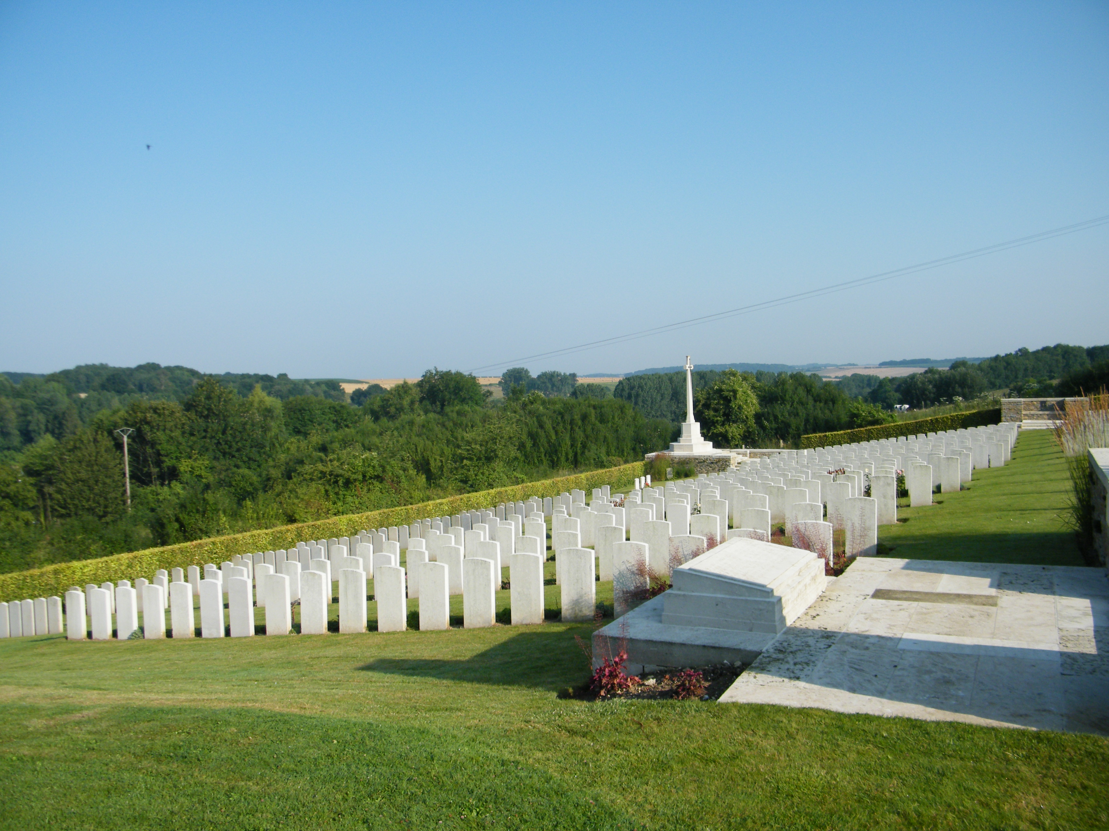 Carré militaire dans le cimetière.